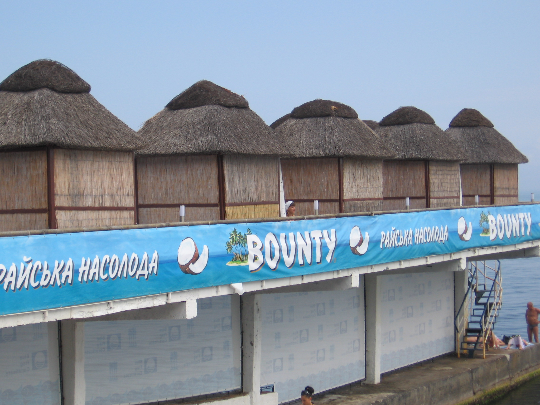 Фото